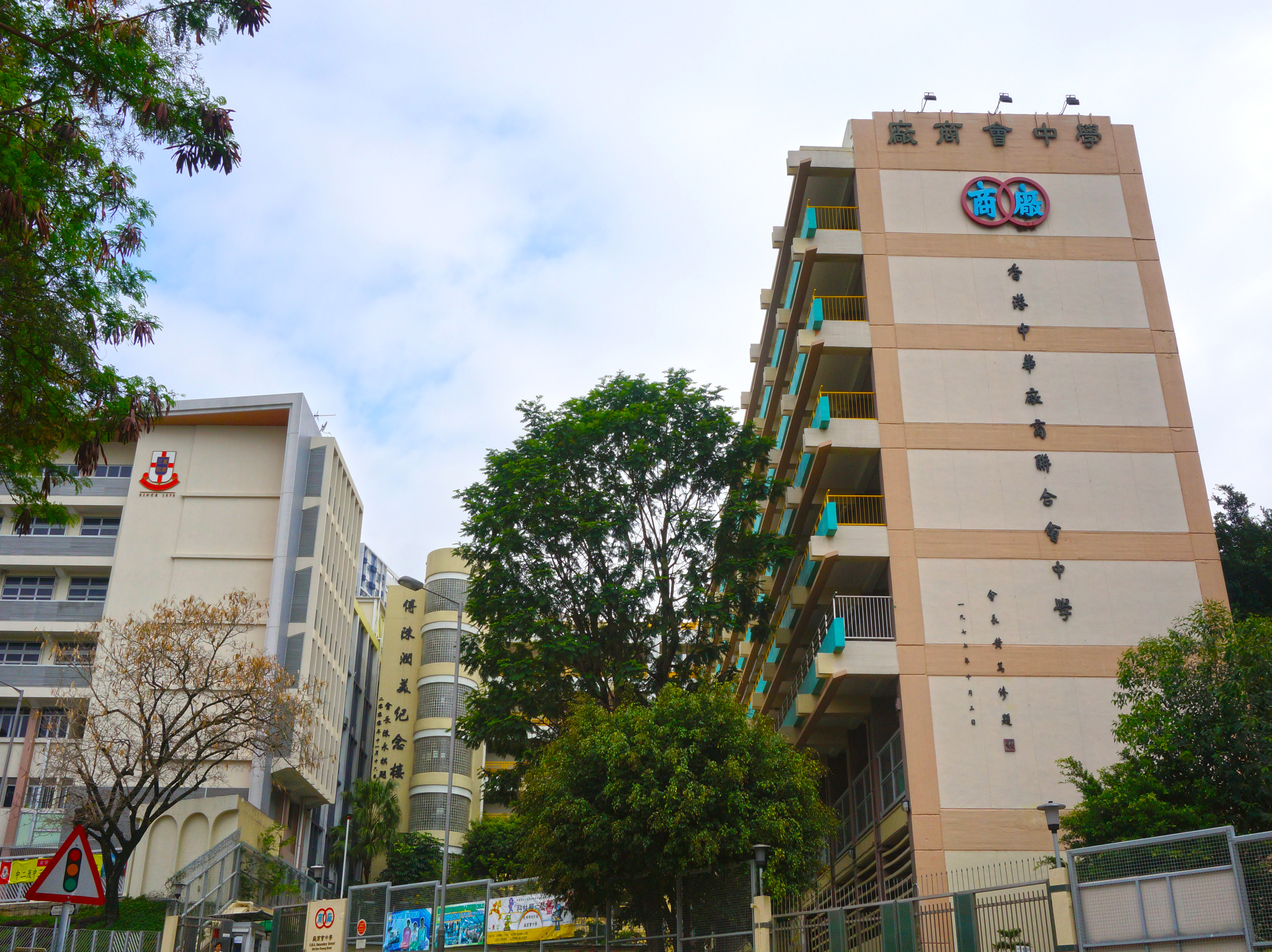 廠商會中學校舍外貌